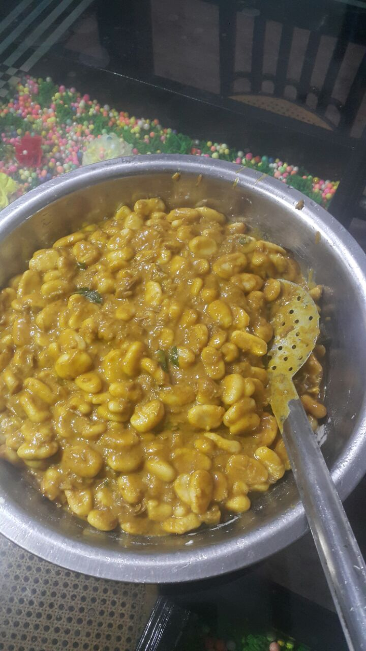 ഈന്തുംപിടി വിഭവം